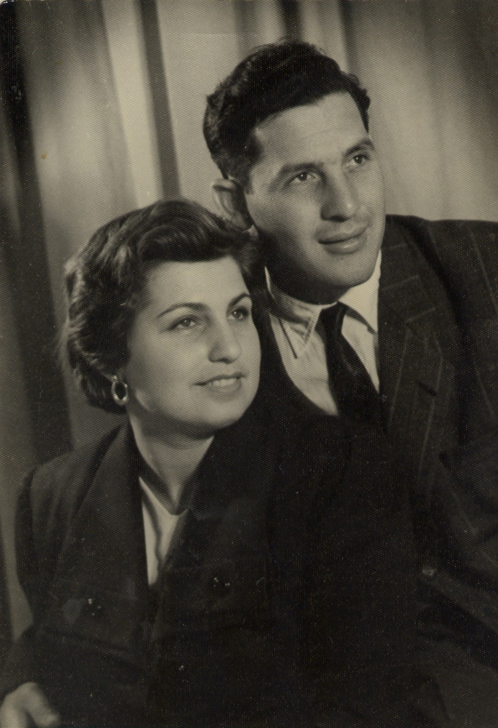 Nissim Almalich with wife Aliza